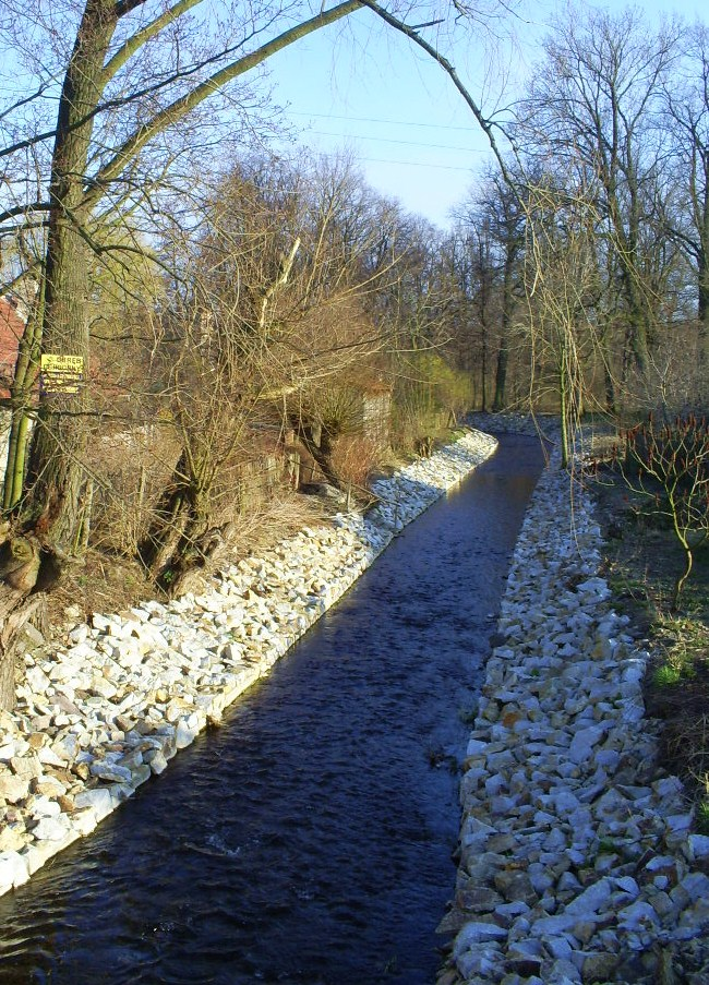 Nysa Mała w Kwietnikach